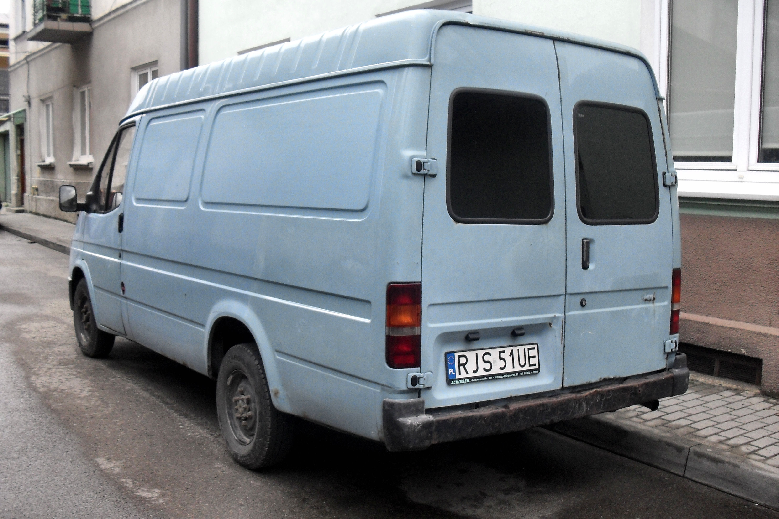 Ford Transit Mk4 w Jaśle.